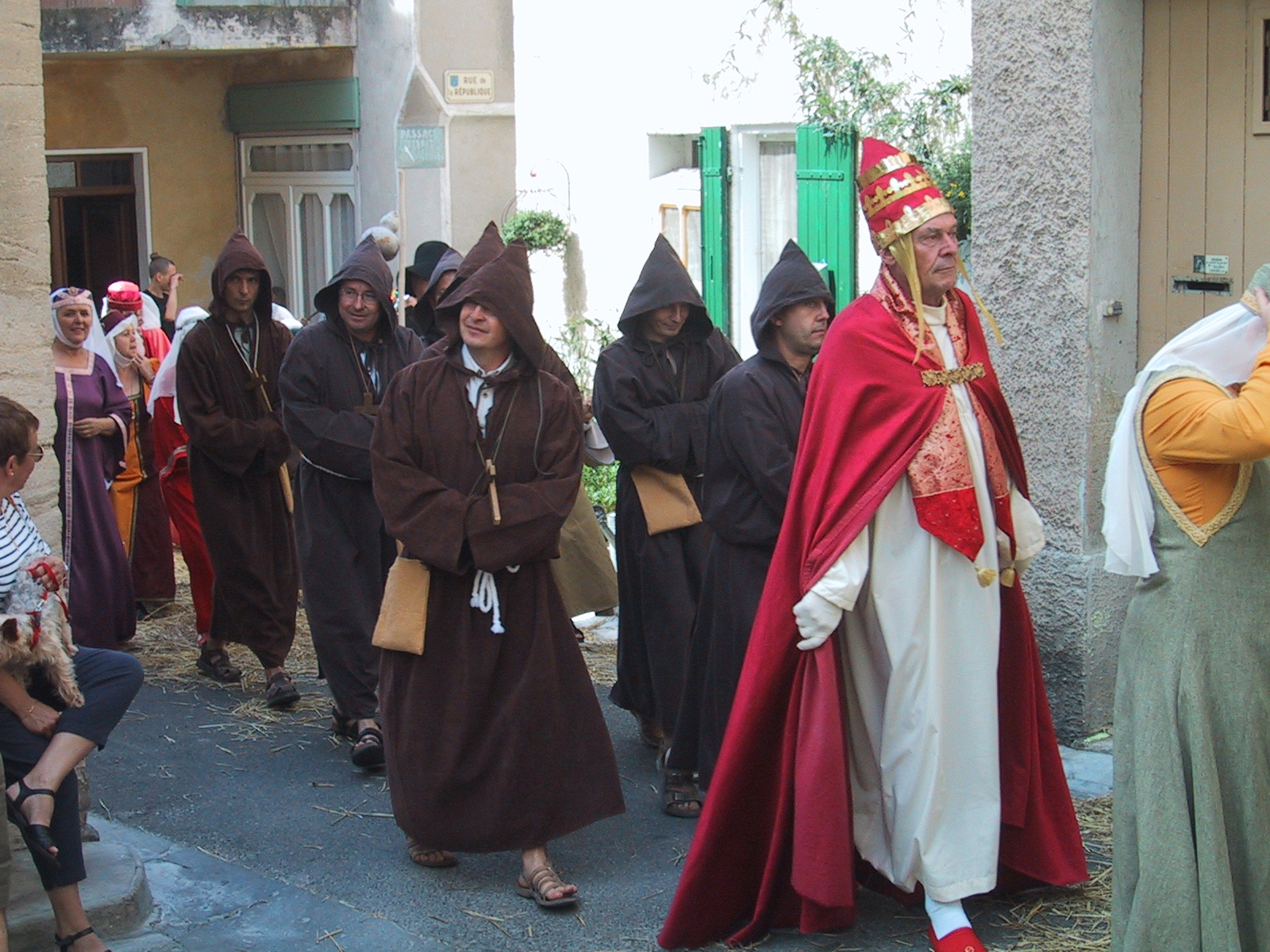 Défilé pontifical à Beaumes-de-Venise